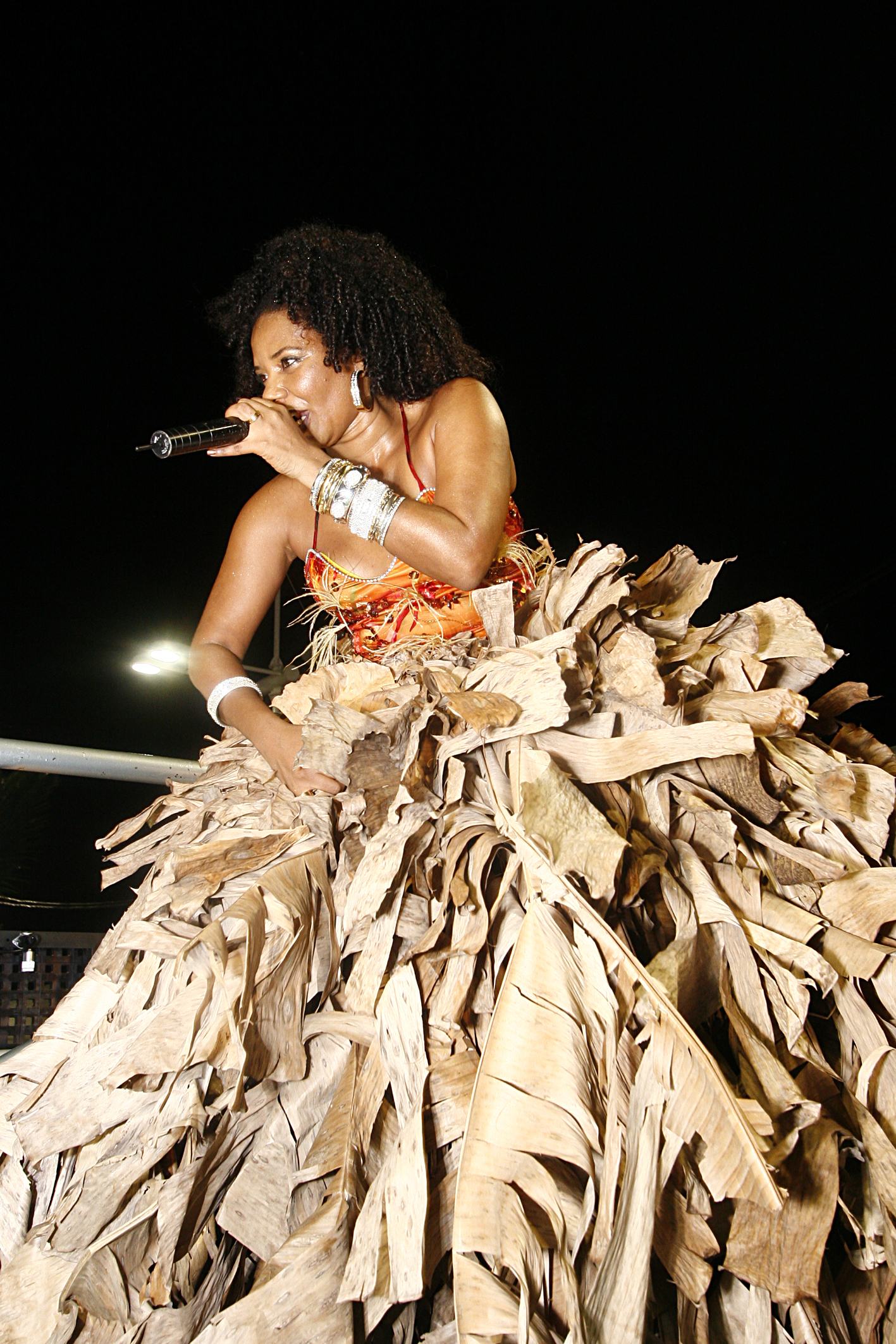 Margareth Menezes recebe convidados no trio Afropopbrasileiro durante o Carnaval 2010, na Barra.